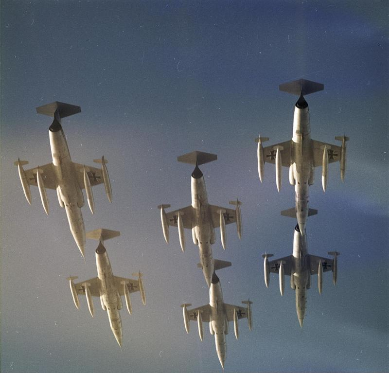 Marinefliegergeschwader 1 M FL. G1 Geschwader Jagel [bei Schleswig] Marine F104G (Starfighter)